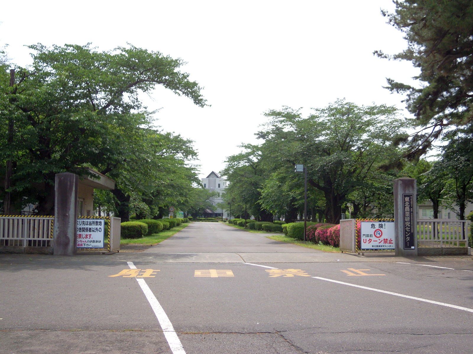 岩手県盛岡市にある東北農業研究センター本所の正門